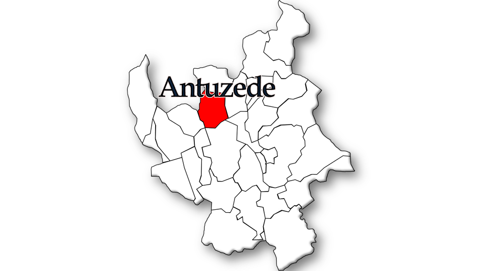 População